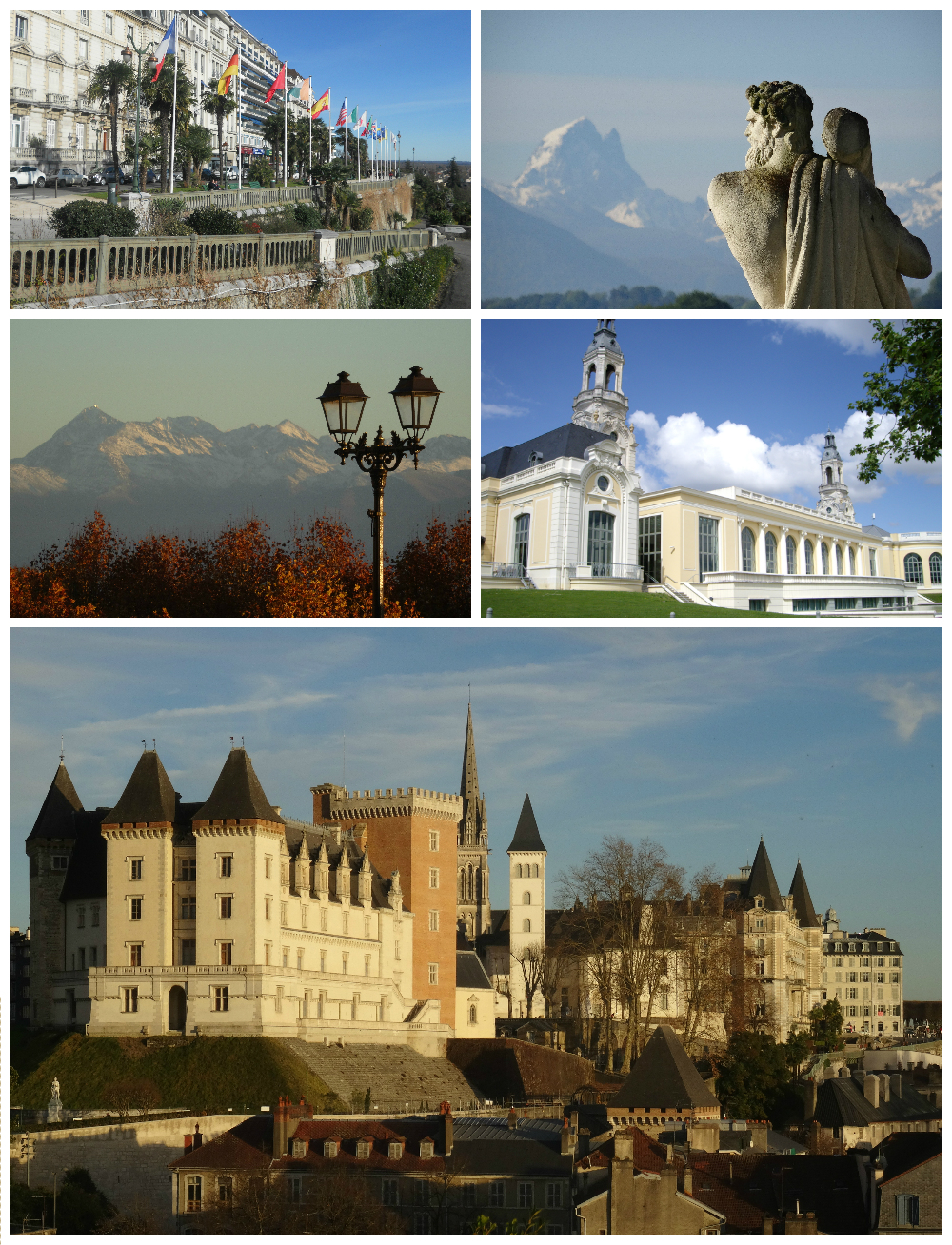 Images, de haut en bas et de gauche à droite : Boulevard des Pyrénées Pau 1.JPG par Flo641. Pic du Midi d'Ossau par Flo641. Pic_du_Midi_de_Bigorre_et_lampadaire_Pau.JPG par Flo641. Palais Beaumont.JPG par Florent Pécassou. Vue sur Pau.JPG par Flo641.